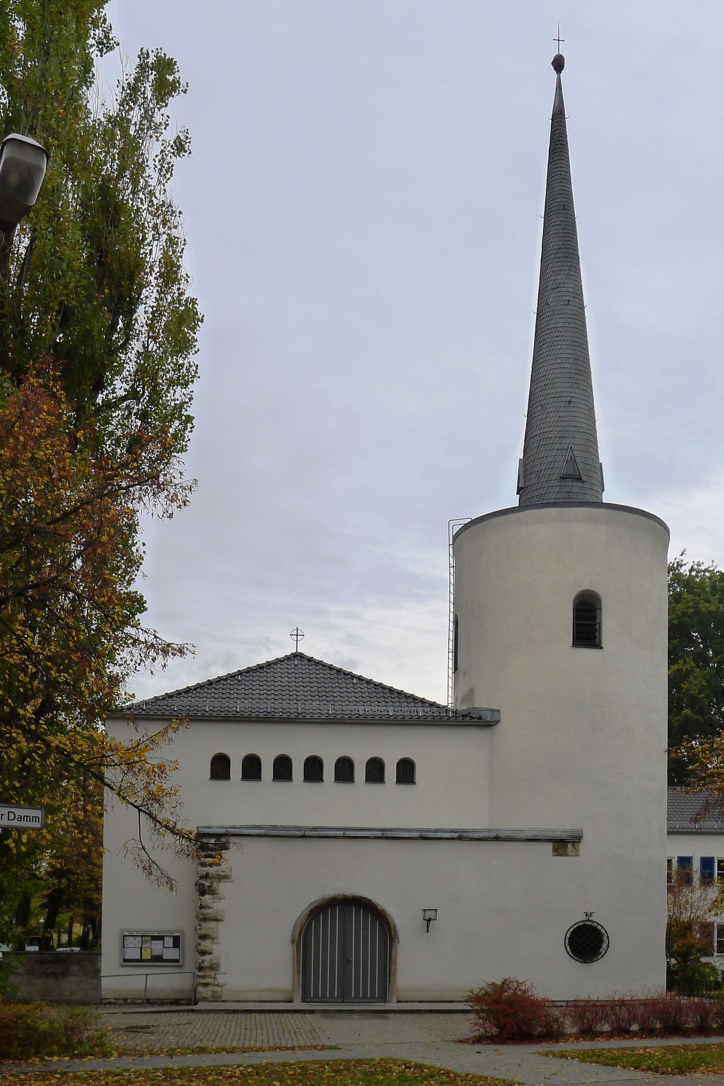 Blick vom Hermsdorfer Damm auf die Kirche